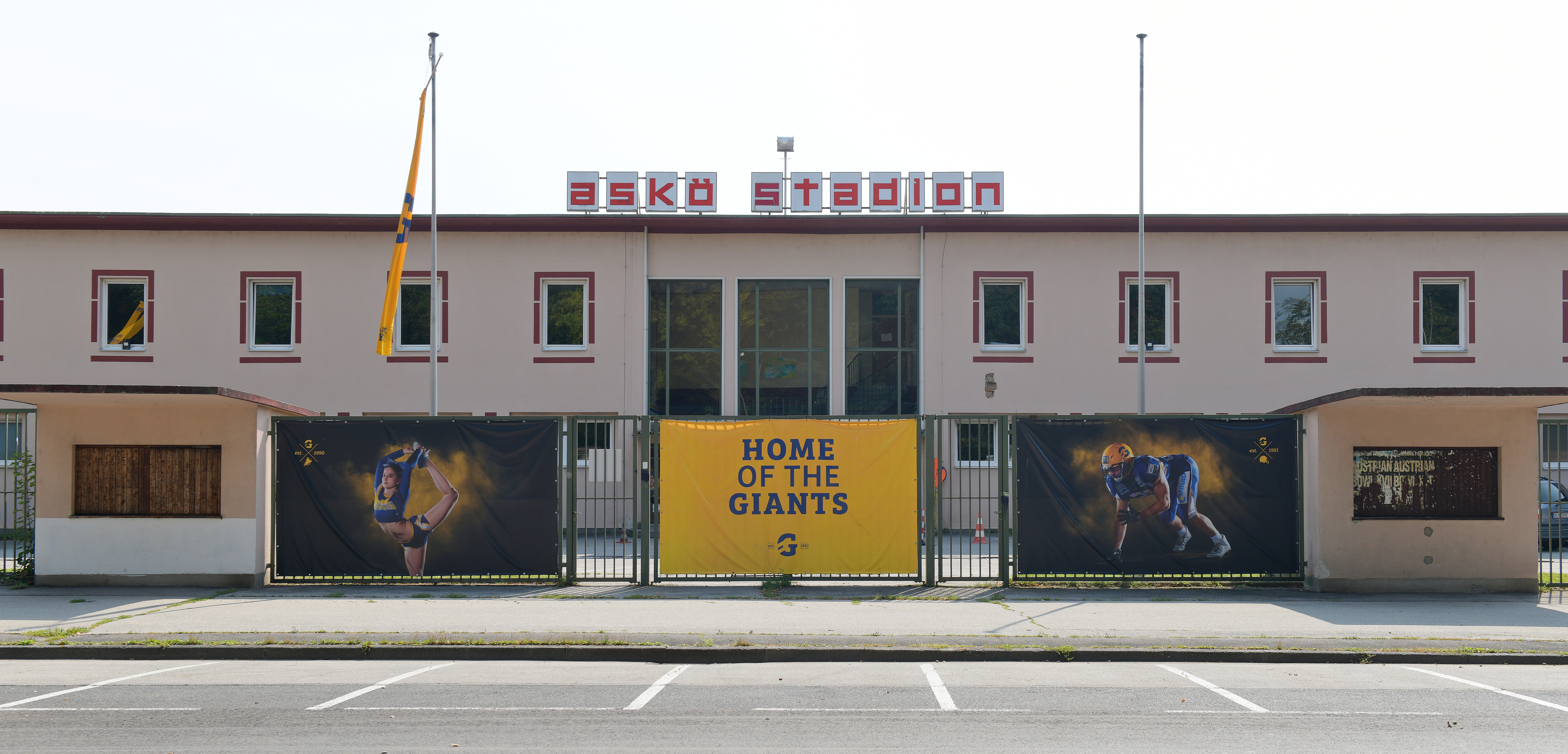 Verwaltungsgebäude ASKÖ Steiermark in der Schloßstraße 20 in Graz Eggenberg